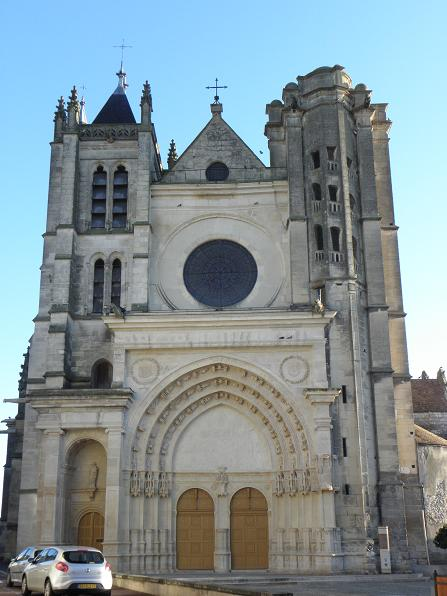 Façade occidentale de la collégiale Notre-Dame-et-Saint-Loup de Montereau-Faut-Yonne (77).